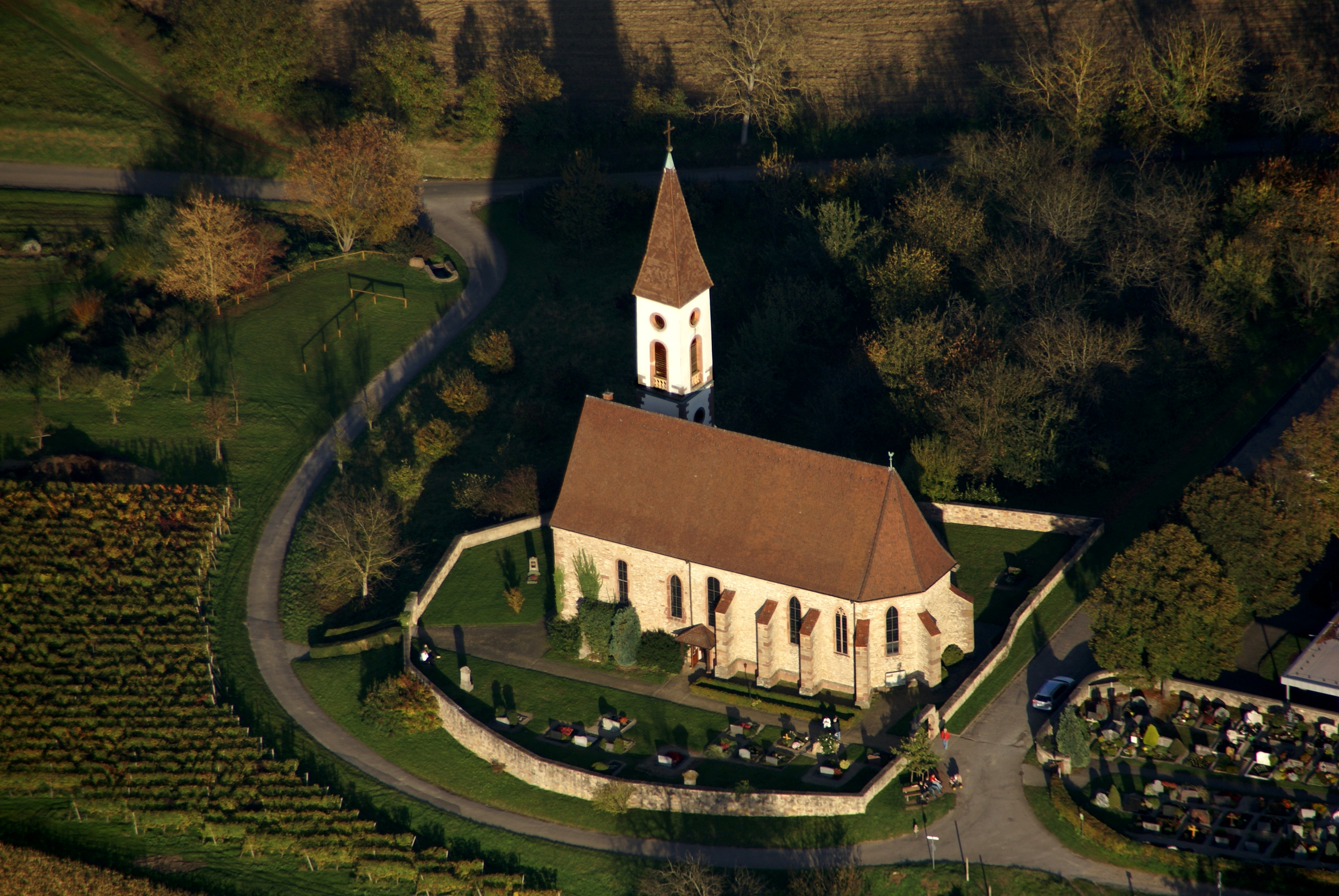 Luftbild von der ca. im Jahre 1530 erbauten Bergkirche auf dem Nimberg südlich von der Gemeinde Nimburg.